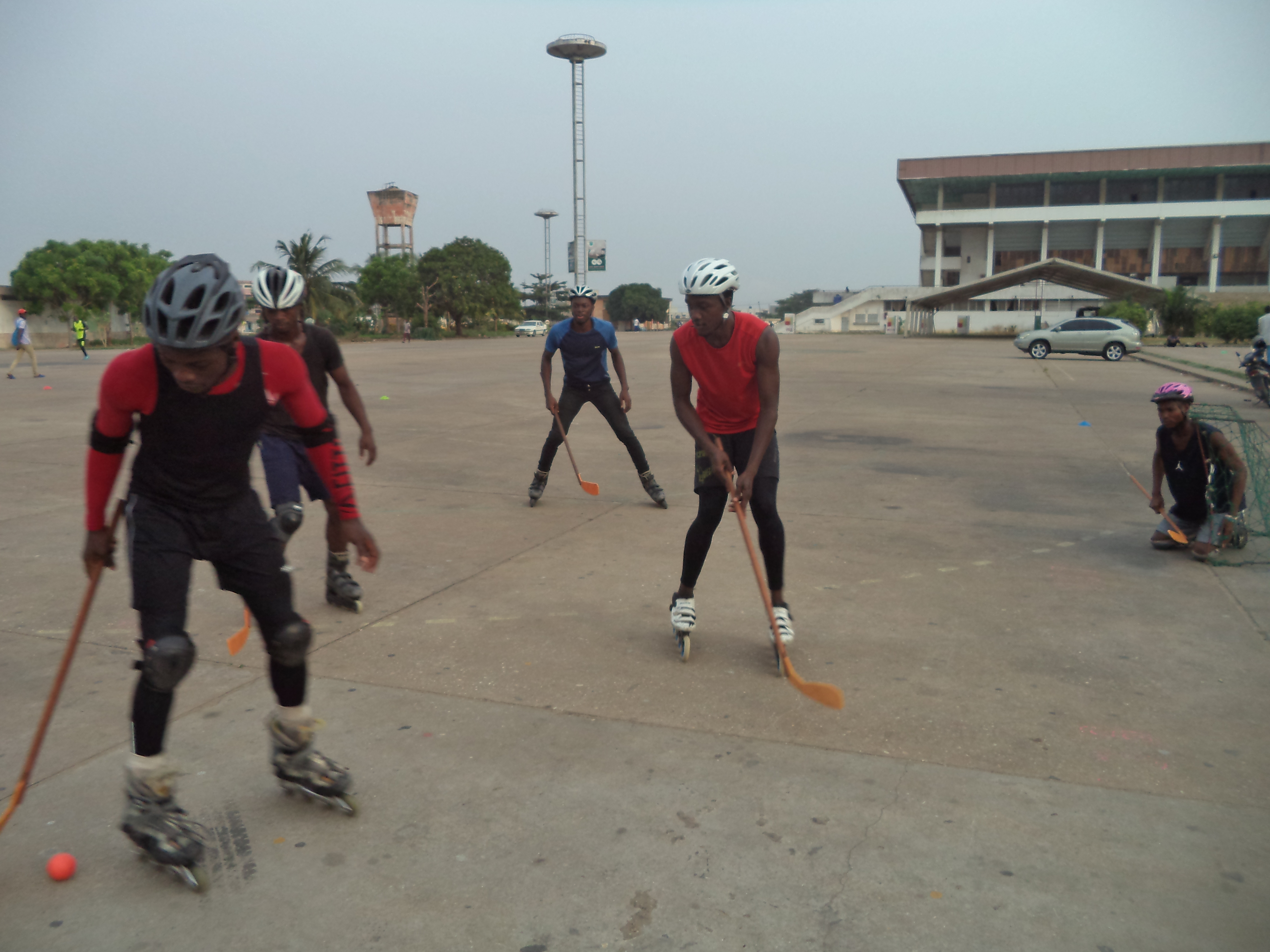 Le roleur sport au stade de l'amitié Général Mathieu KEREKOU de Kouhounou.